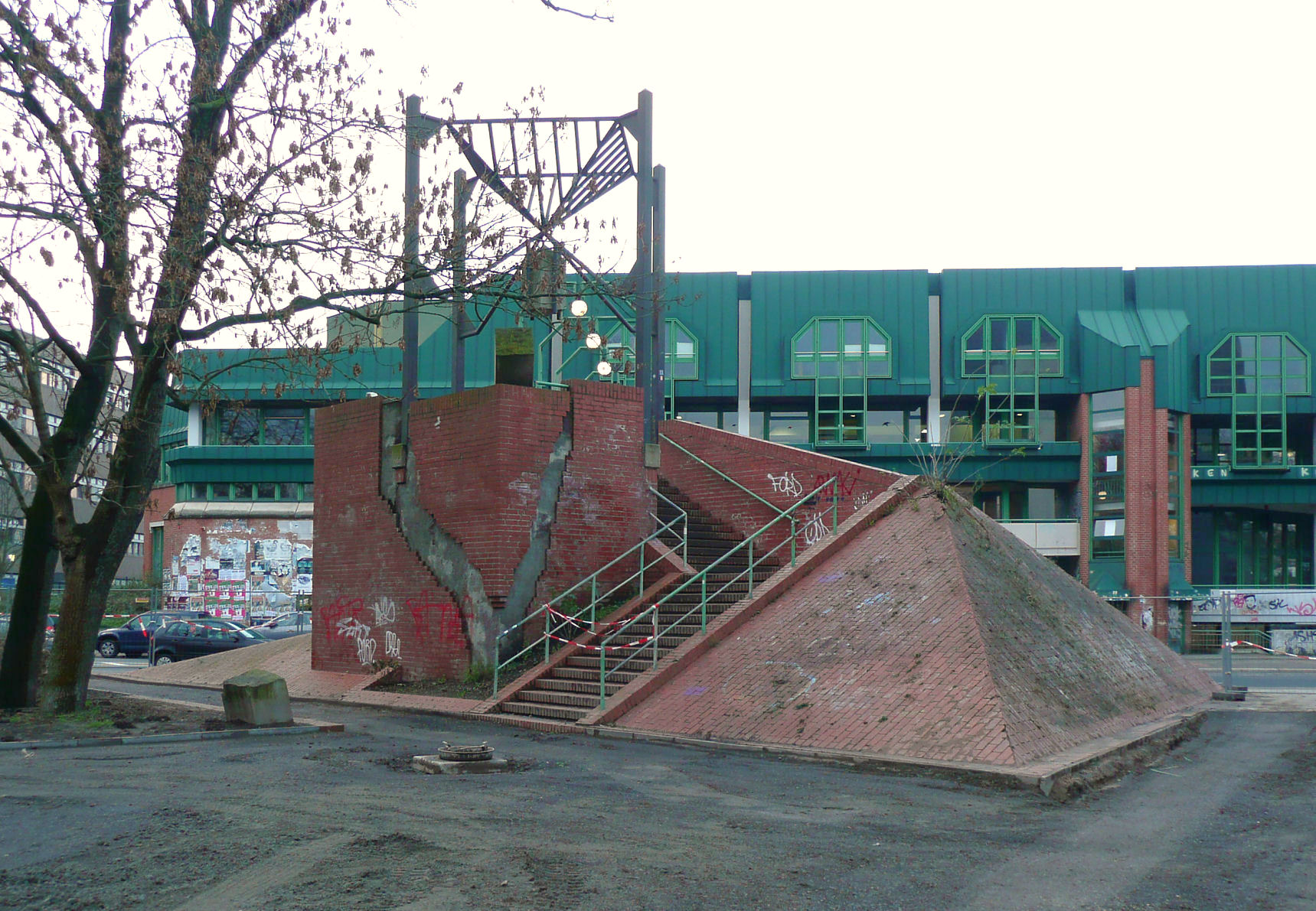 Brückenbastion und Straßenbrücke in Hannover